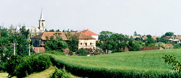 Vedere asupra satului Carani, județul Timiș